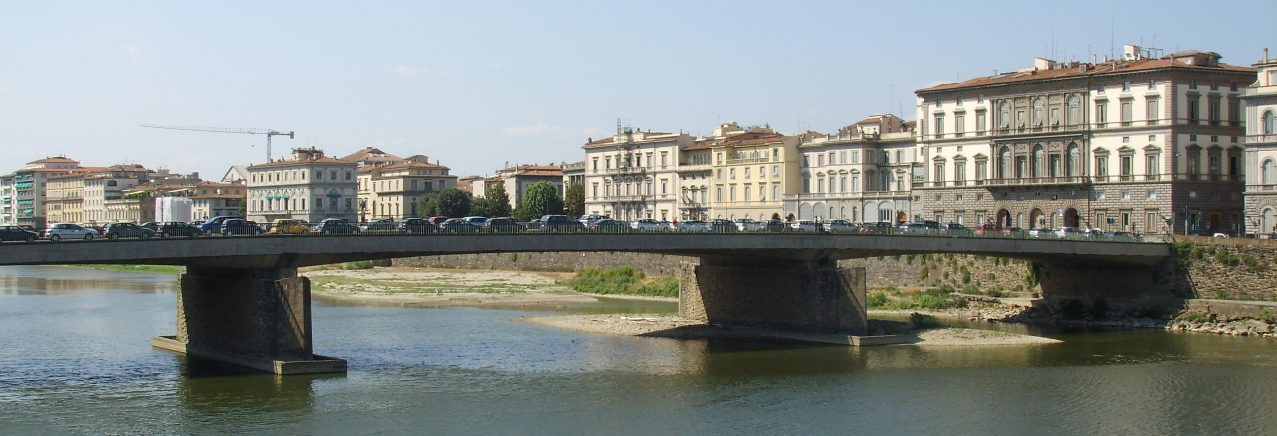 Ponte Amerigo Vespucci, Florence, Italy